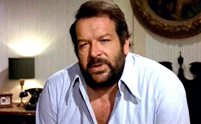 Bud Spencer mint Piedone